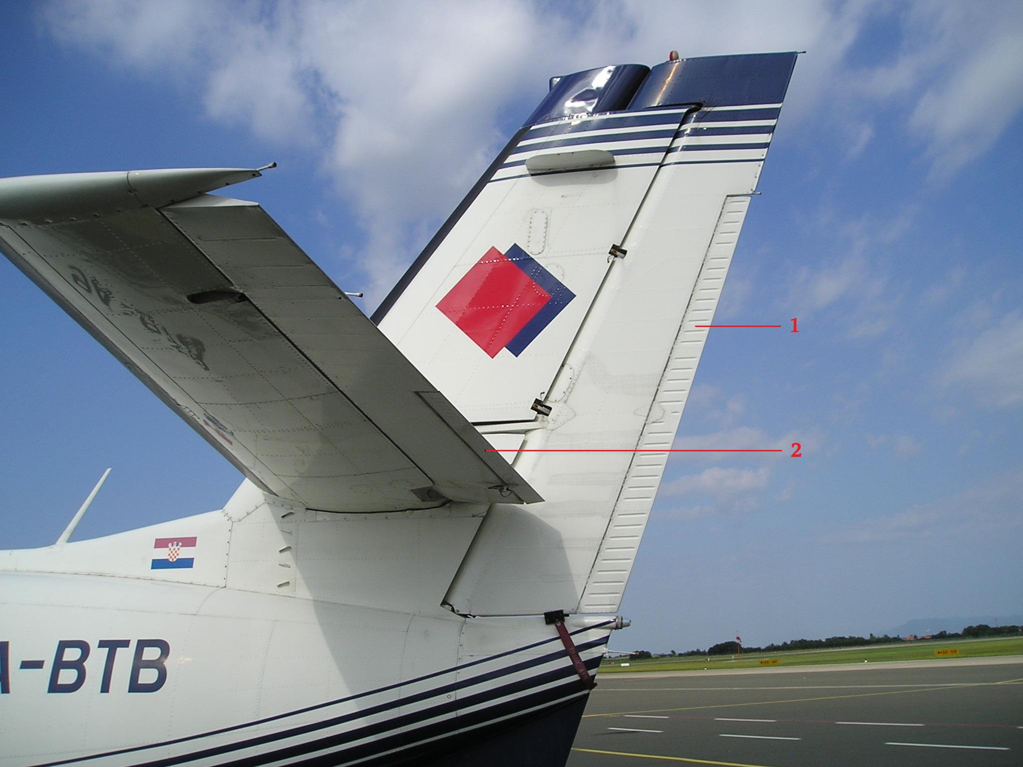 Balance tab (trim tab)